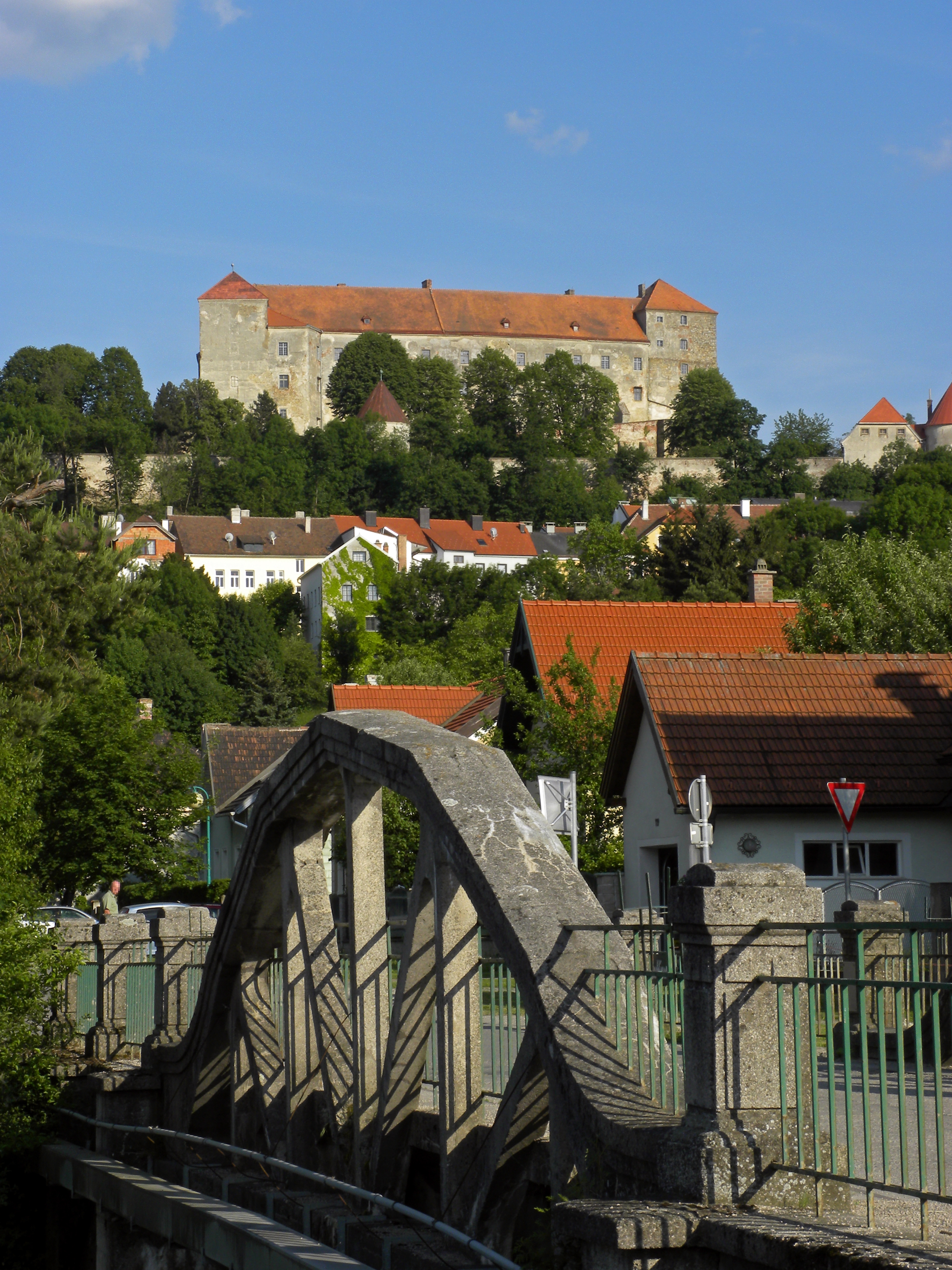 Brücke Schulgasse mit Blick Richtung Burg